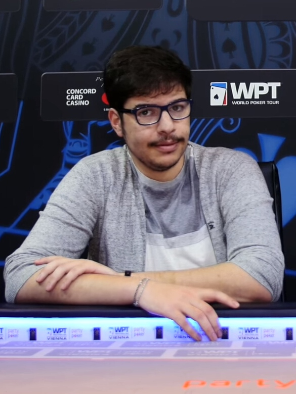 Mustapha Kanit bei der WPT Wien